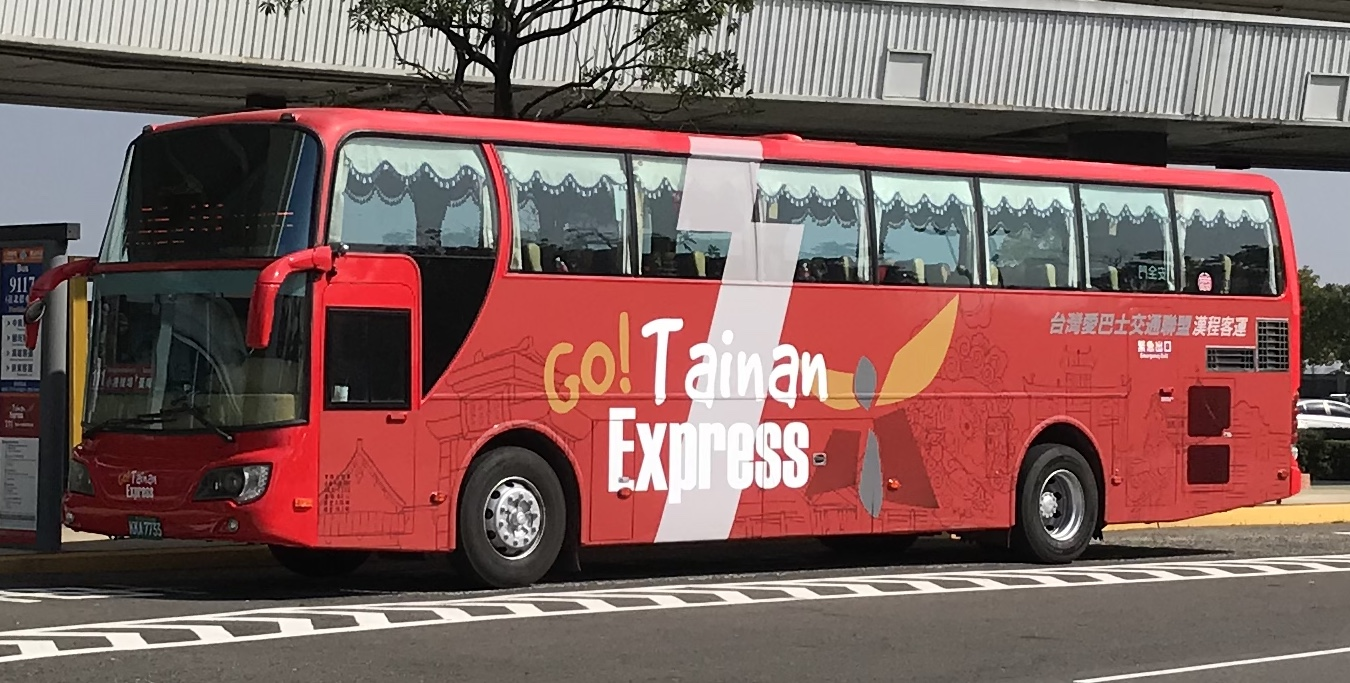 大宇FX116